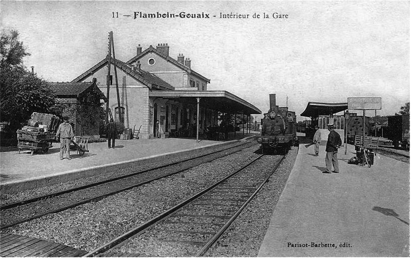 L'intérieur de la gare de Flamboin-Gouaix au début des années 1900.